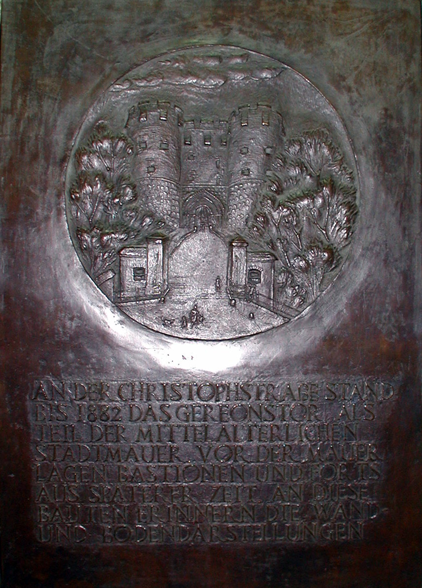 Städtische Gedenktafel Gereonstor, Köln. Darstellung des mittelalterlichen Stadtmauertores vor dem Abriss im Jahr 1882